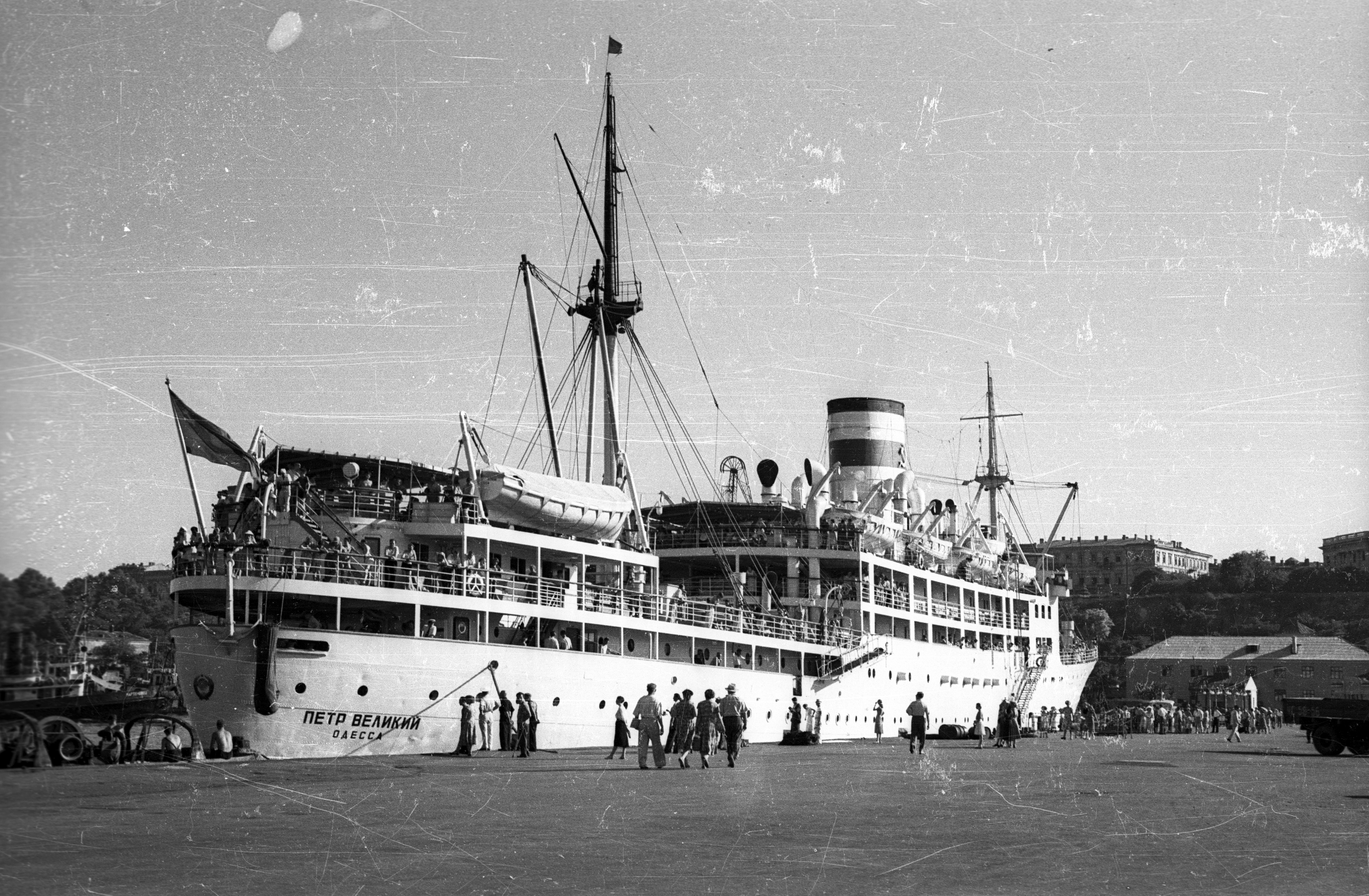 a Petr Velikij személyszállító hajó a kikötőben. Location: Ukraine, Odessa Tags: ship, port, Soviet Union, Peter the Great-ship, Cyrillic alphabet Title: a Petr Velikij személyszállító hajó a kikötőben.